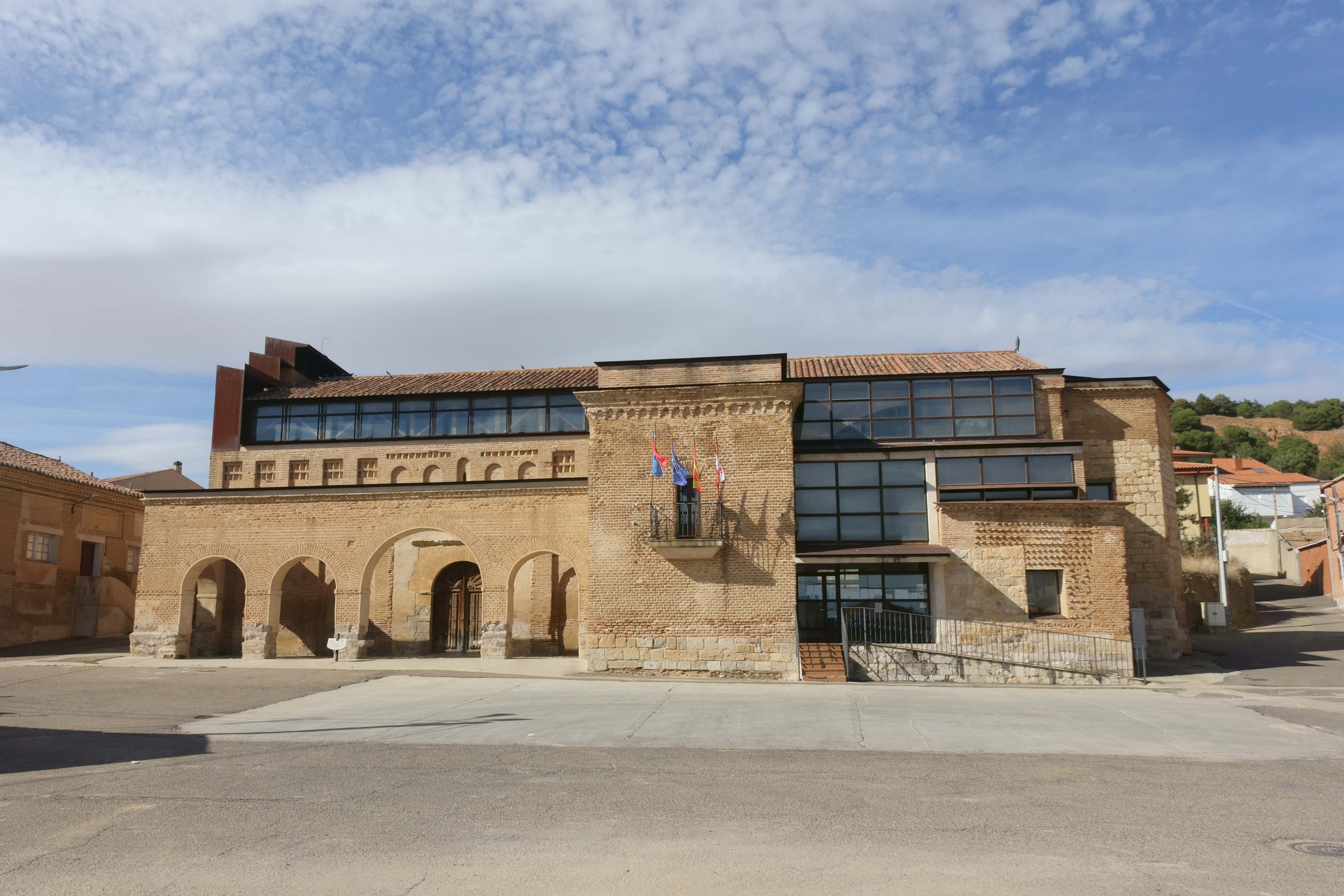 Casa consistorial de Belver de los Montes (Zamora, España).